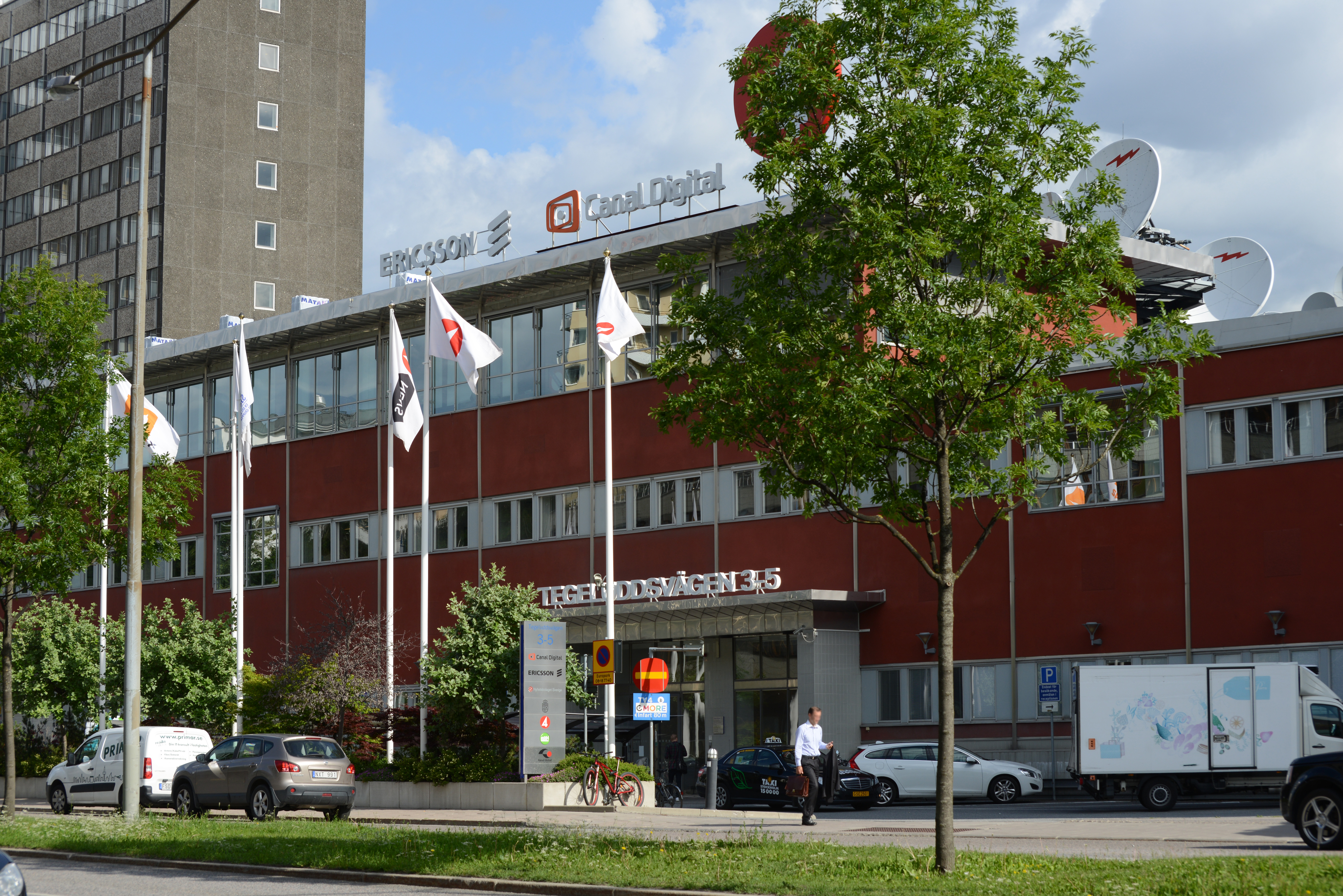 Canal Digital Sveriges huvudkontor i TV4-huset i Stockholm